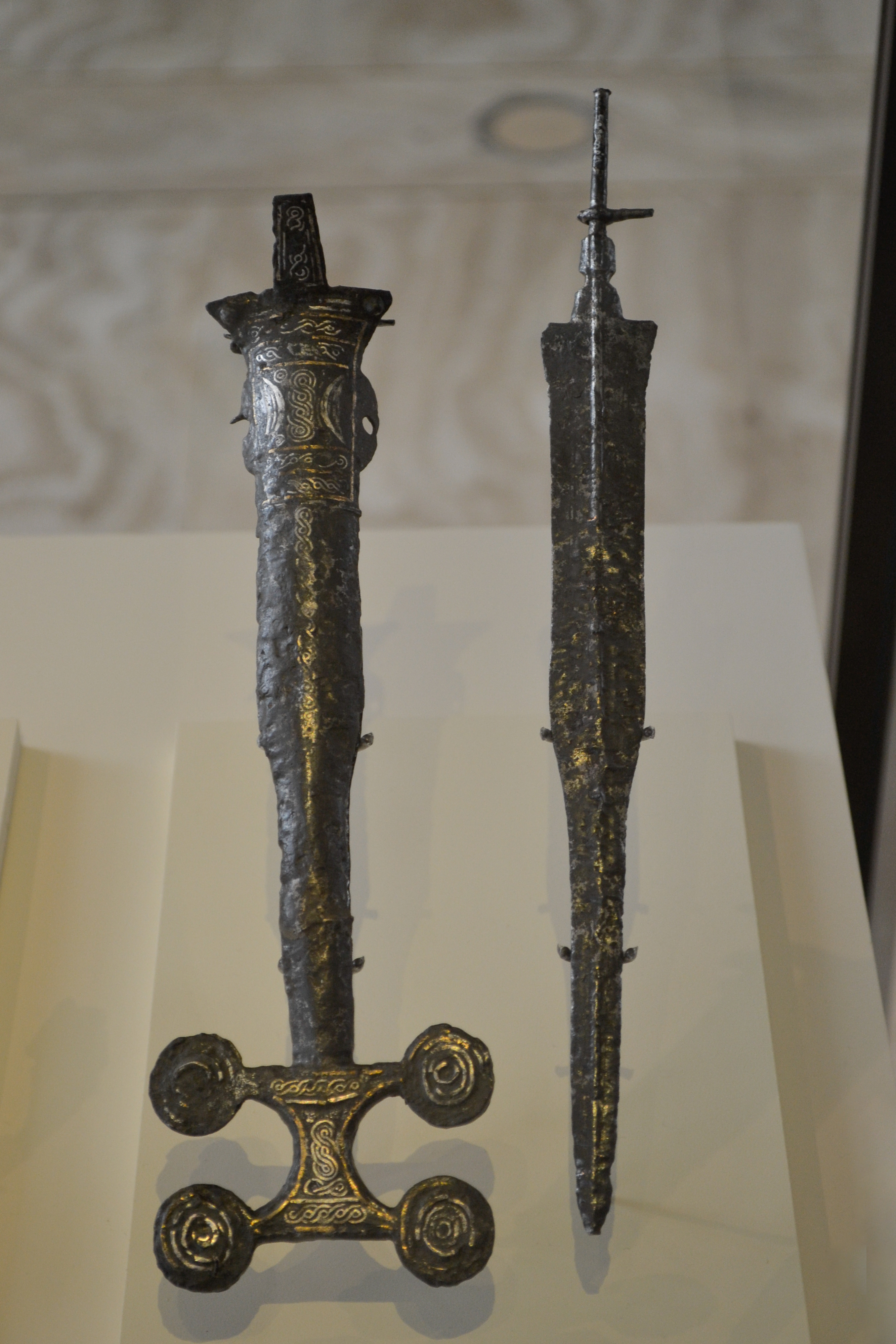 Puñal y vaina vetones de la Necrópolis de Sasamón (Sasamón, Burgos). Siglo IV-III a. C. Museo Arqueológico Nacional de España. Puñal de tipo Monte Bernorio-Miraveche, formado por una hoja pistiliforme atrofiada con espiga de enmangue. El pomo, naviforme, no se conserva; presenta restos de decoración damasquinada en plata. Tipología: Monte Bernorio-Miraveche. Quesada III. Técnica: Empuñadura de puñal: Damasquinada. Hoja: Hierro forjado. Longitud: 27,20 cm. Espiga: Longitud: 6 cm; grosor = 0,40 cm. Hoja de puñal: Longitud: 21,40 cm; anchura máxima: 2,70 cm. Nº inv. 1958/45/4. Vaina de puñal Monte Bernorio-Miraveche, formado por un armazón de hierro con contera tetradiscoidal, con cuatro discos circulares unidos entre sí y decoración damasquinada en plata. El cuerpo de la vaina presenta un estrangulamiento inferior, donde va embutida la hoja del puñal; en la parte superior, la embocadura se ensancha y presenta una lengüeta laminar. La decoración, consiste en motivovs geométricos y está realizada mediante un damasquinado en plata, localizado en la embocadura de la vaina y en la contera inferior. Procedencia:Necrópolis de Sasamón (Sasamón, Burgos). Tipología: Monte Bernorio-Miraveche. Quesada III. Técnica de la contera de la vaina: Damasquinado y hierro forjado. Técnica de la embocadura de vaina: Damasquinado. Materia: Contera de vaina: Plata y hierro. Longitud: 23,40 cm; grosor: 0,20 cm; anchura máxima: 3,10 cm; anchura mínima: 1,40 cm. Contera de vaina: Altura: 5,40 cm; anchura: 7,10 cm; grosor: 1 cm. Disco: Diámetro: 2,30 cm. Nº inv. 1958/45/5.